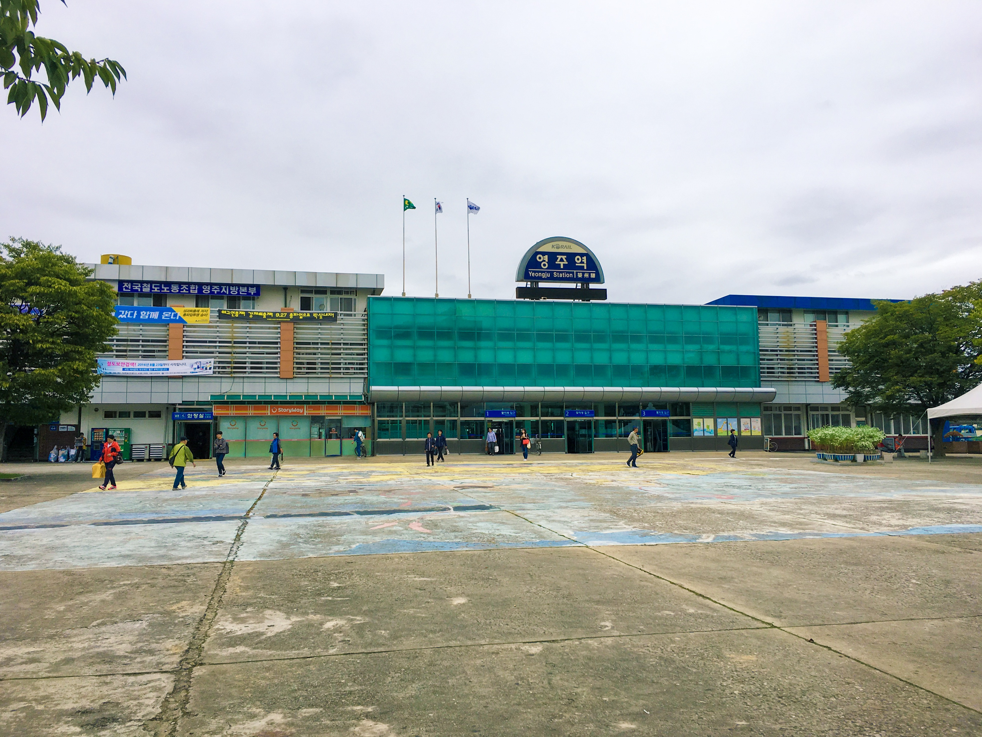 영주역 역사